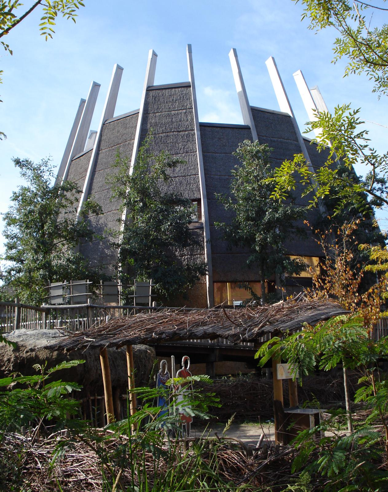 Rotterdam, diergaarde Blijdorp. Giraffenhuis.